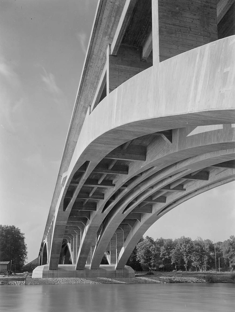 Donaubrücke Leipheim, km 105,139 Bogenuntersicht Die Brücke wurde von der OBR Stuttgart gebaut und im April 1945 gesprengt. Für den Wiederaufbau war die Autobahn-direktion München zuständig.